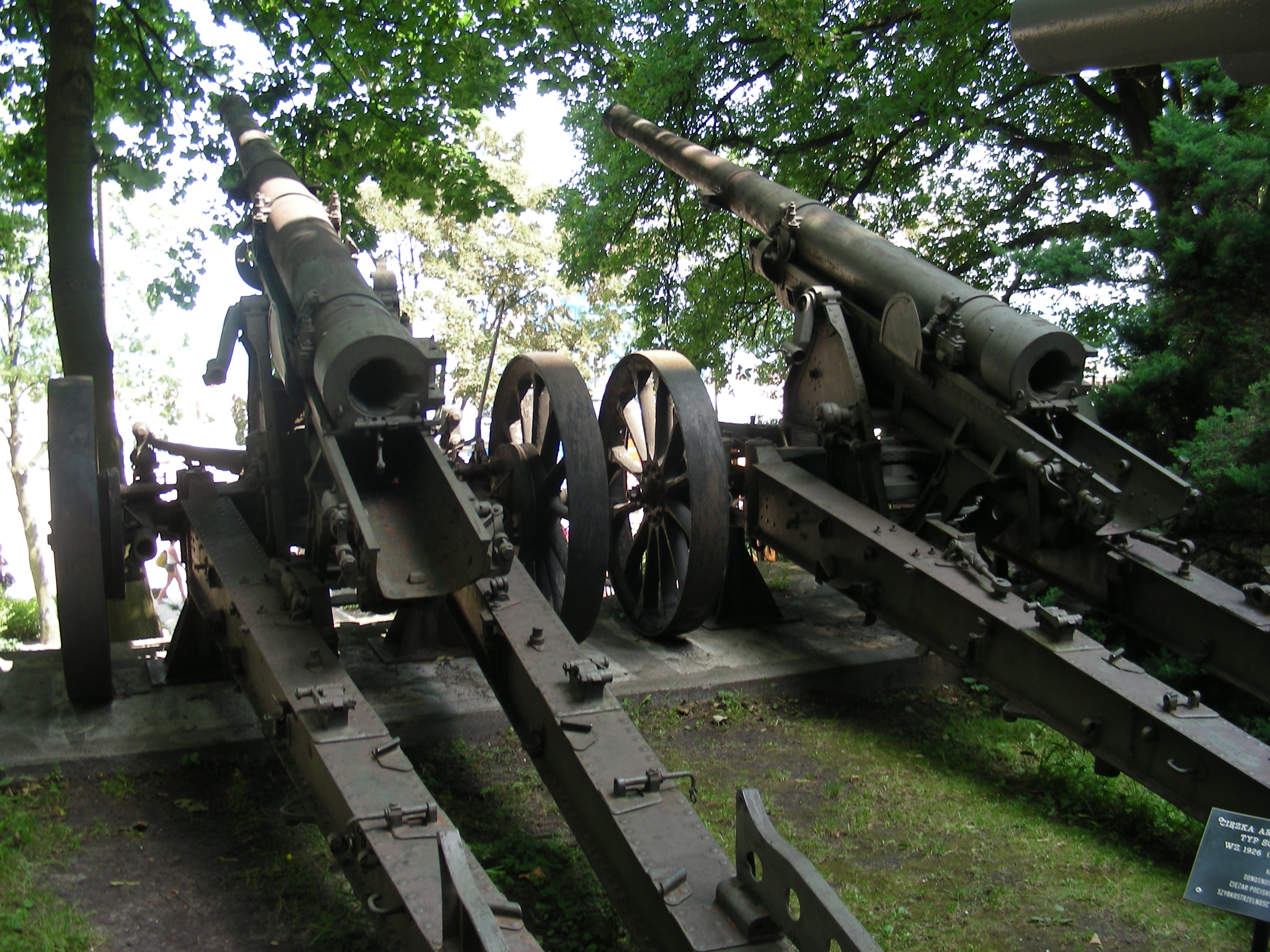 Muzeum Marynarki Wojennej w Gdyni, armaty polowe wz 1926 kal. 105 mm.